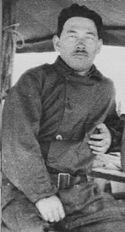 嶋崎重和海軍大尉。上海・公大基地にて。加賀分隊長時代の昭和12年9月18日～11月30日頃。 Lieutenant Shigekazu Shimazaki of the Imperial Japanese Navy, as the division commander of the aircraft carrier Kaga. At Gongda Airbase, Shanghai, 1937.